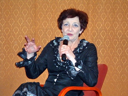 Ewa Dałkowska, Polish actress